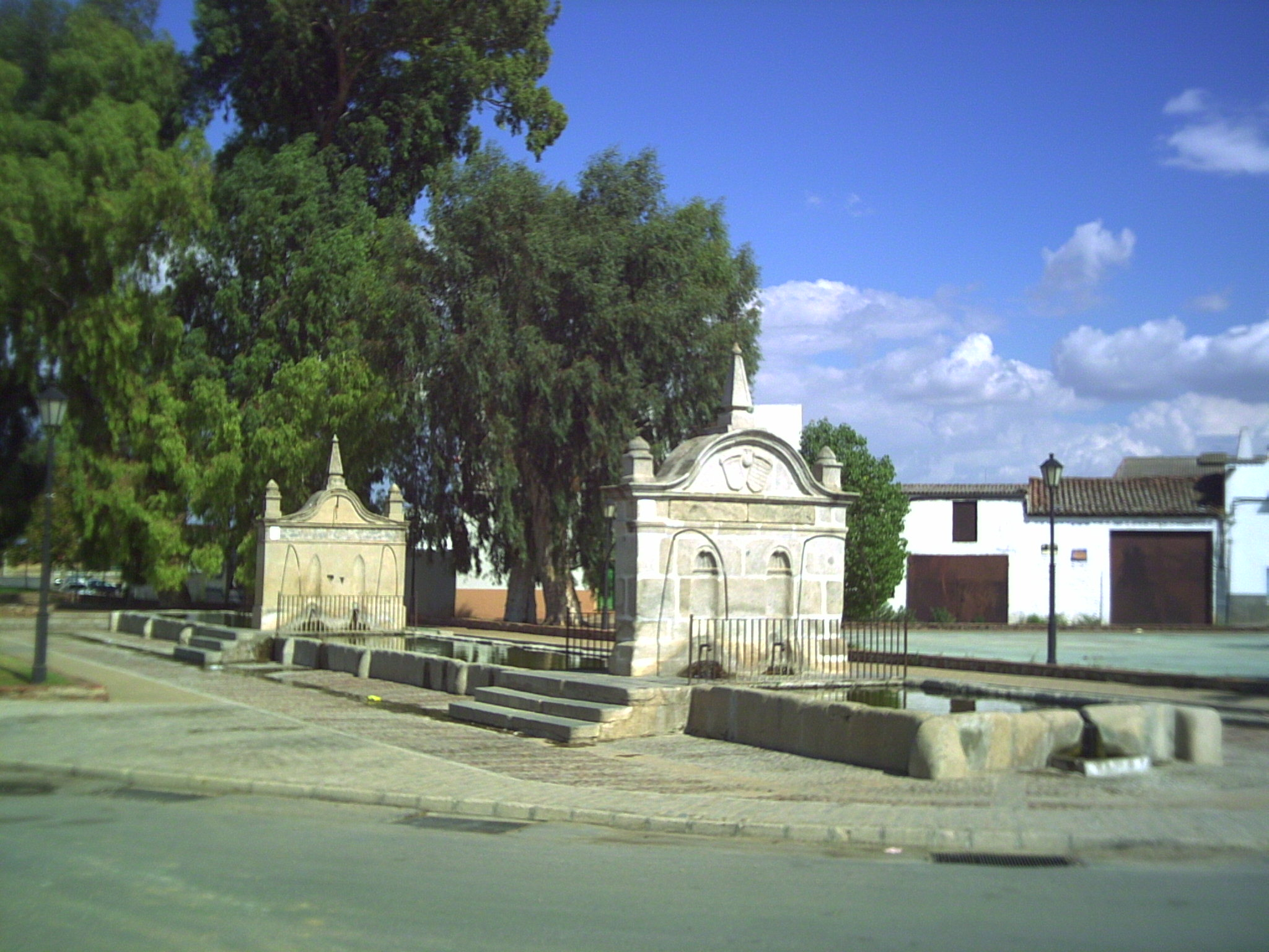 Fuente de El Pilar de los Llanos en Hinojosa del Duque (Córdoba) (España)